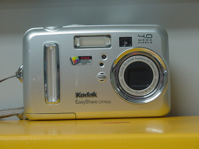 Appareil photographique numérique Kodak EasyShare CX7430